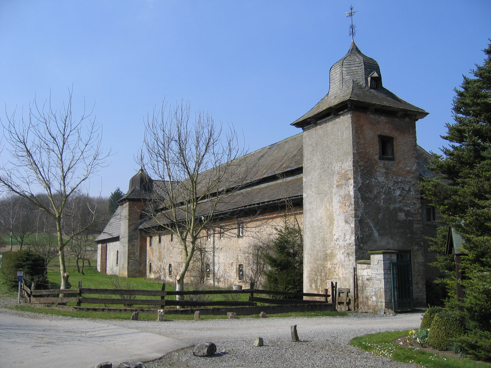 Ehemaliges Schloss Amecke der Freiherren von Wrede-Amecke (Privatbesitz) in Sundern-Amecke.